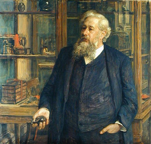 Justus Brinckmann was Director of the ‚Museums für Kunst und Gewerbe‘ in Hamburg